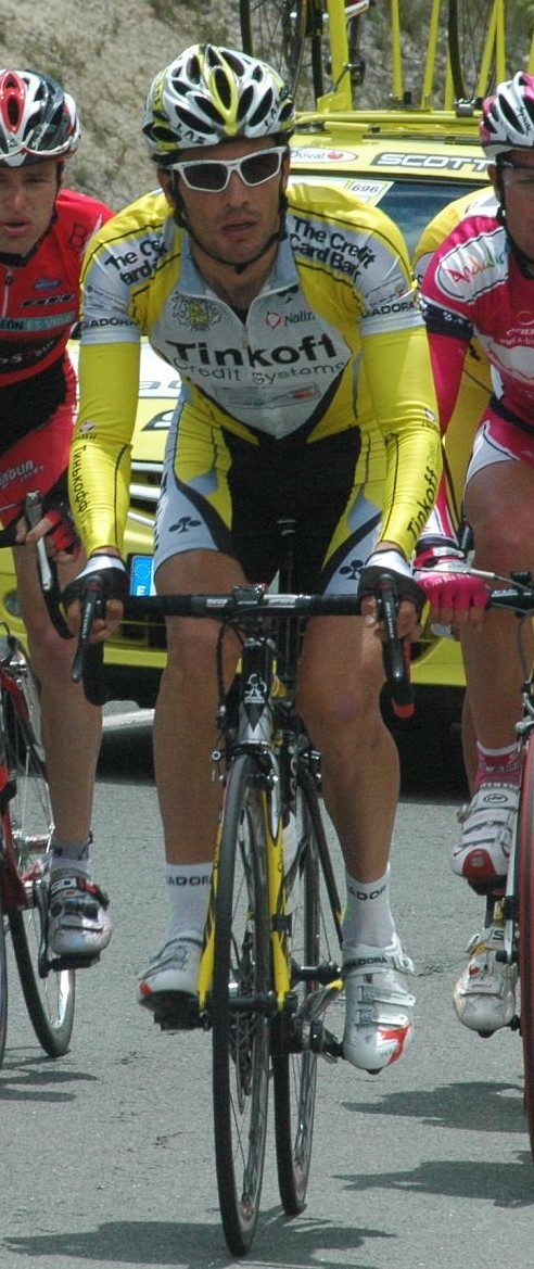 Ricardo Serrano (Tinkoff). Euskal Bizikleta 2008, stage 2, escape.